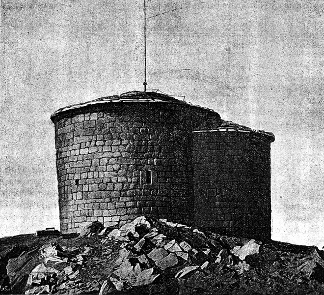 Негошева Капела до перестроительства